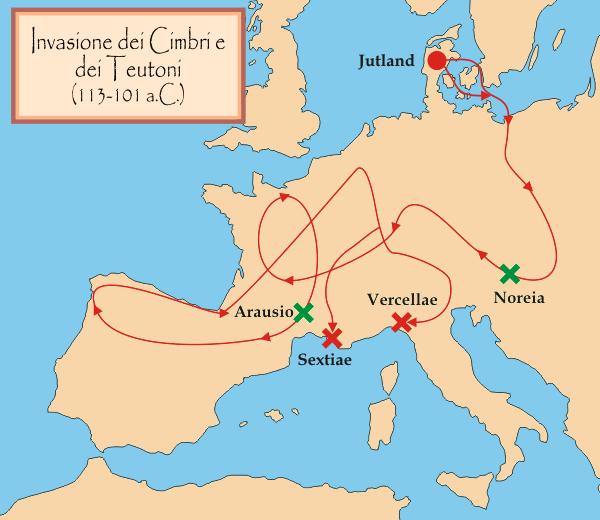 Invasione dei Cimbri e dei Teutoni Jutland: origine Croci verdi: vittorie Croci rosse: sconfitte